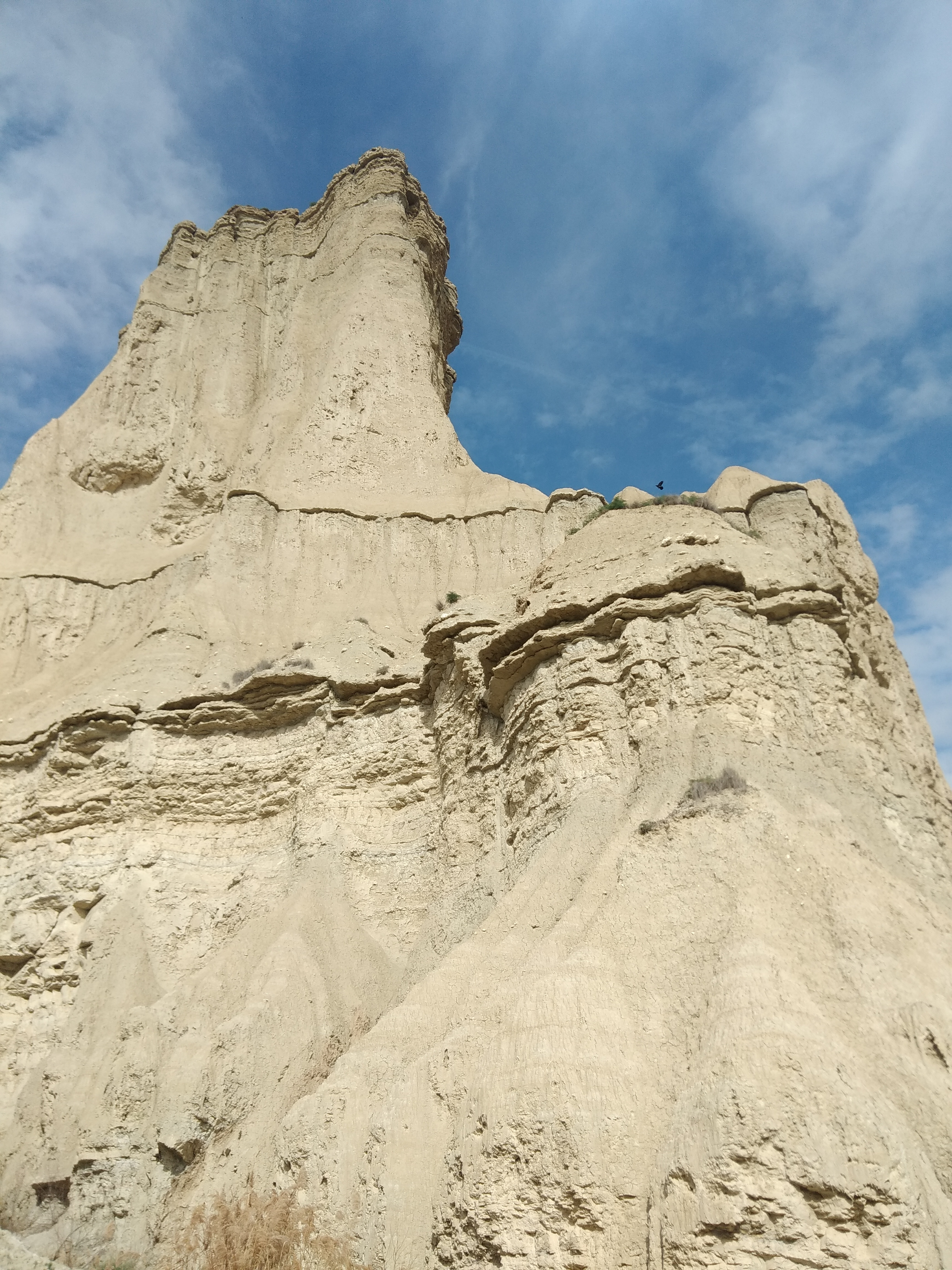 Barranco de Peñalén, Funes, Navarra, España